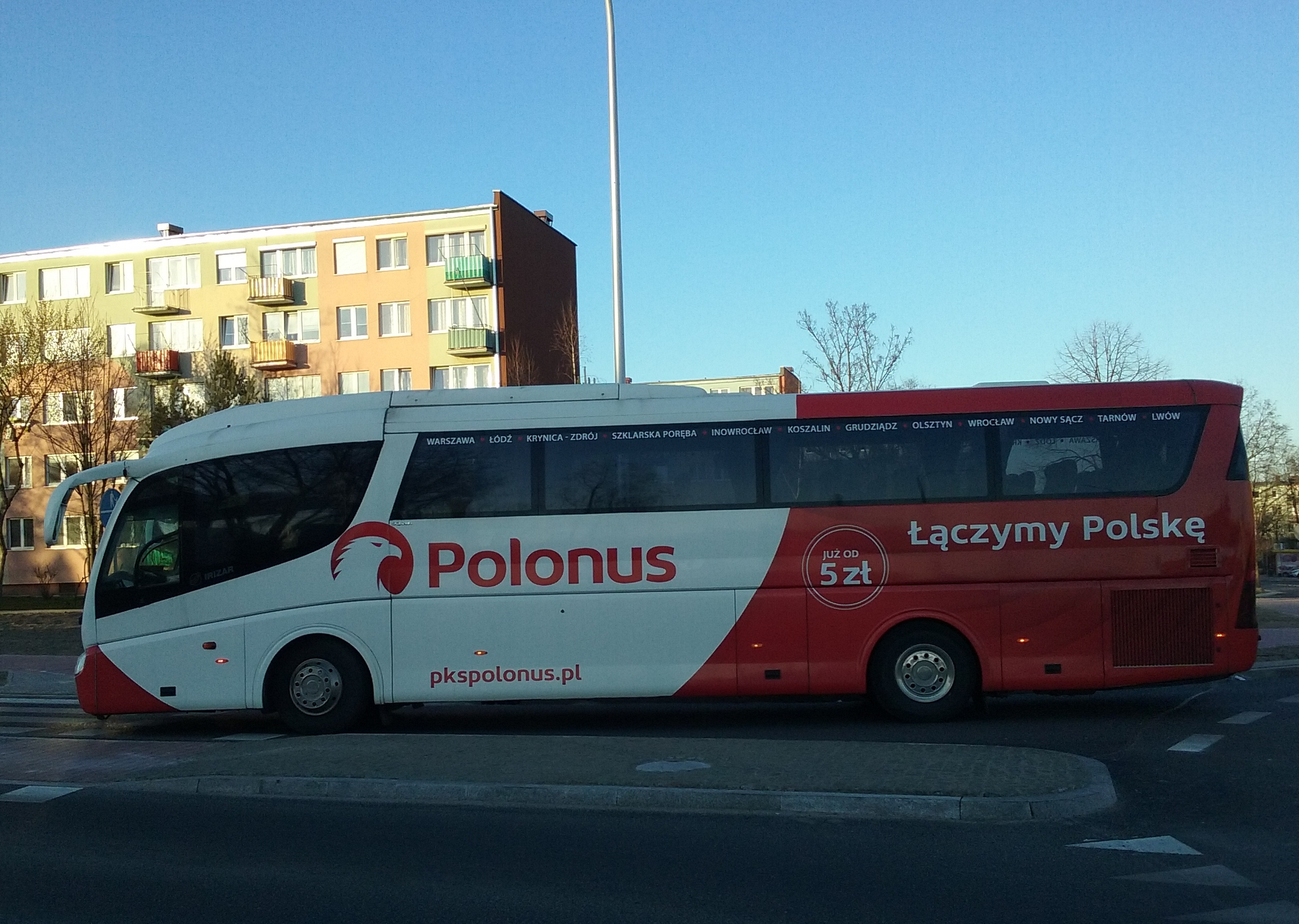 Tomaszów Mazowiecki w województwie łódzkim, PL,EU. Autobus warszawskiego Polonusa na trasie spod Areny Lodowej w Tomaszowie do Warszawy. CC0